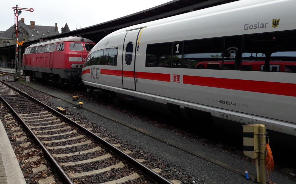 ICE-Triebzug 333 mit Schlepplok 218 835 in Goslar zur Zugtaufe